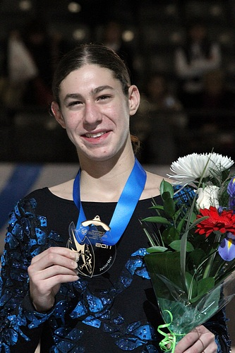 Джейсон Браун на финале Гран-при среди юниоров сеона 2011-2012